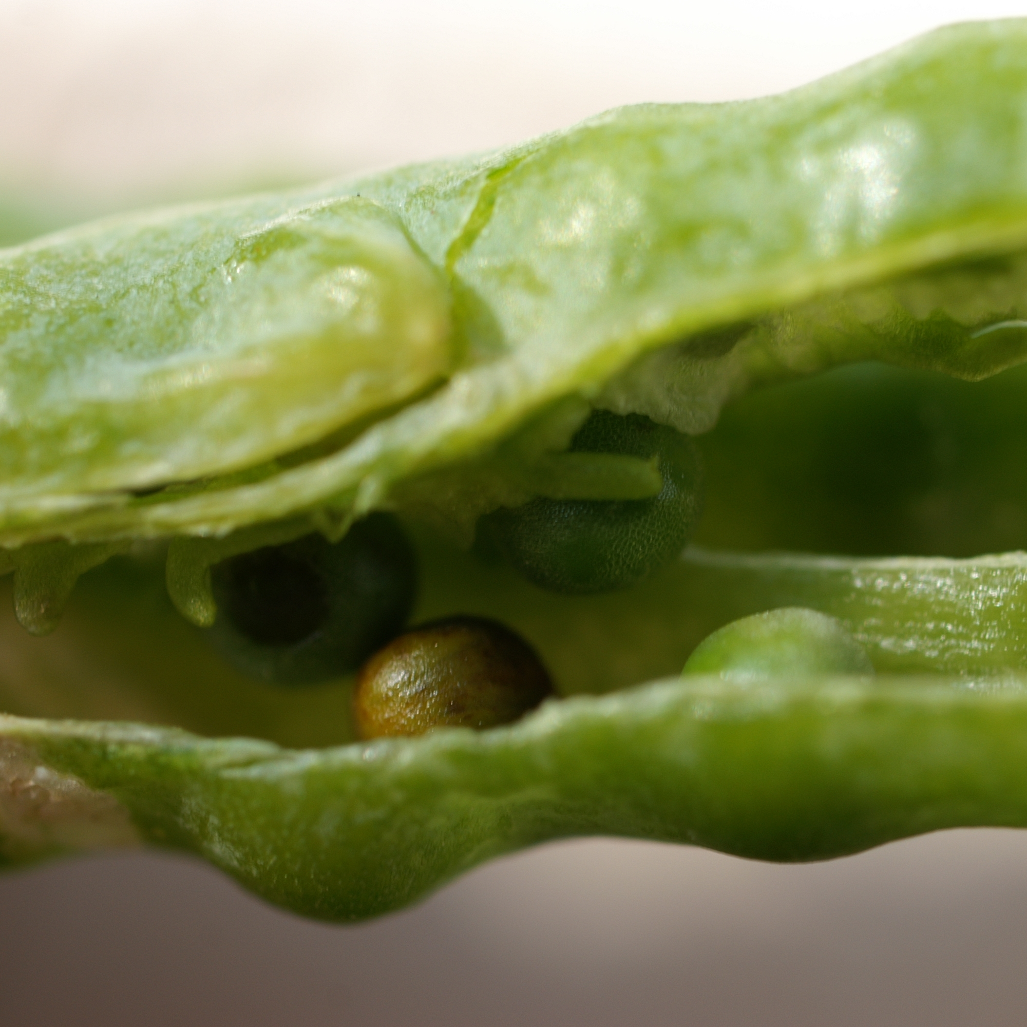 Rapskorn in der Schote